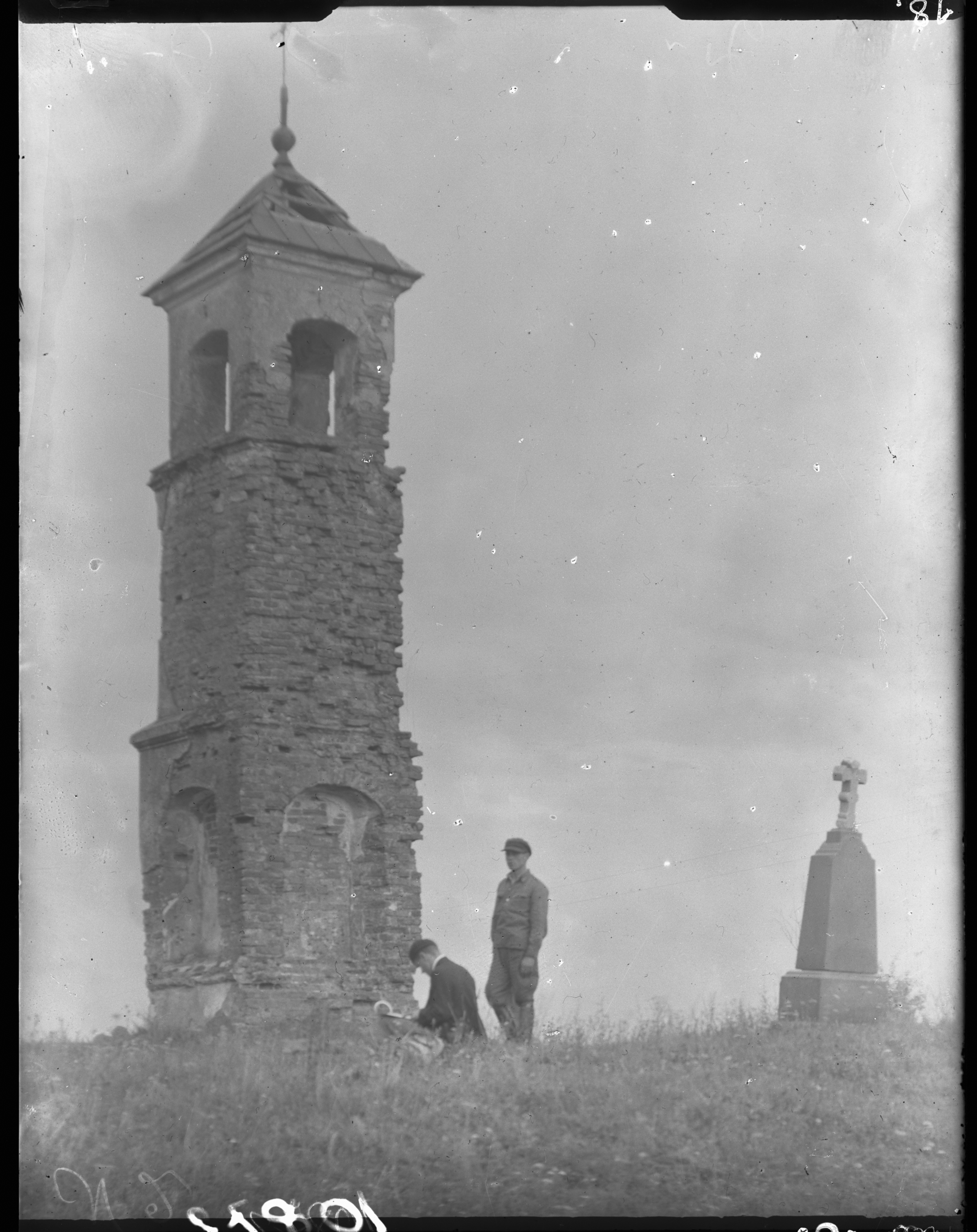 Беларуская (тарашкевіца): Безьдзеж (Bieździež). Калёна ў гонар Канстытуцыі 3 траўня